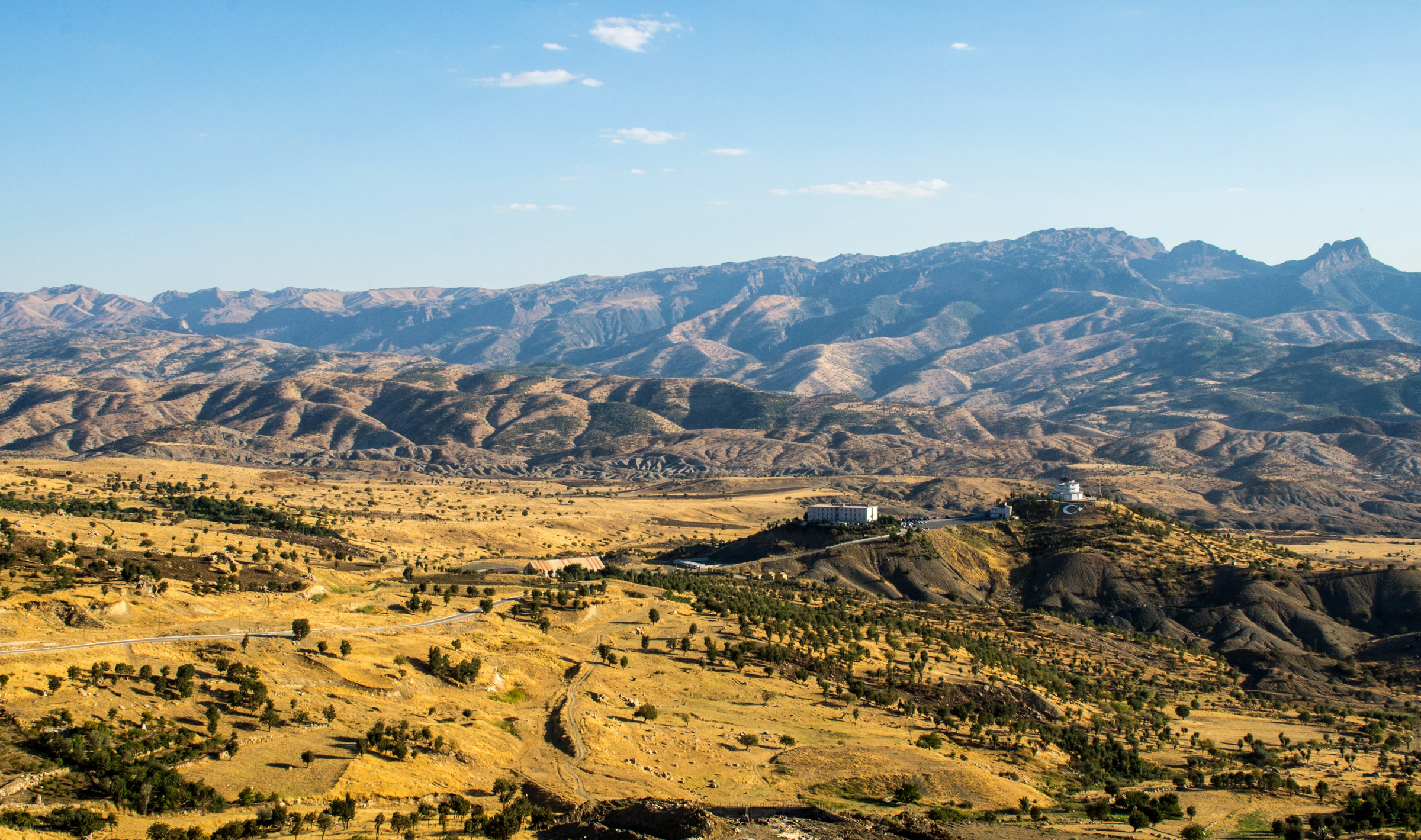 Die Gebirgskette Cudi Dağı, von Şırnak aus gesehen. Aufgenommen im September 2013, im Rahmen des "International Noah and Judi Mountain Symposium".